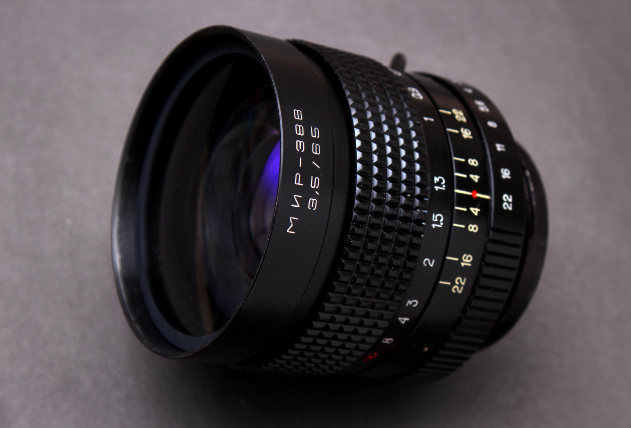 Объектив «Мир-38В» 3,5/65